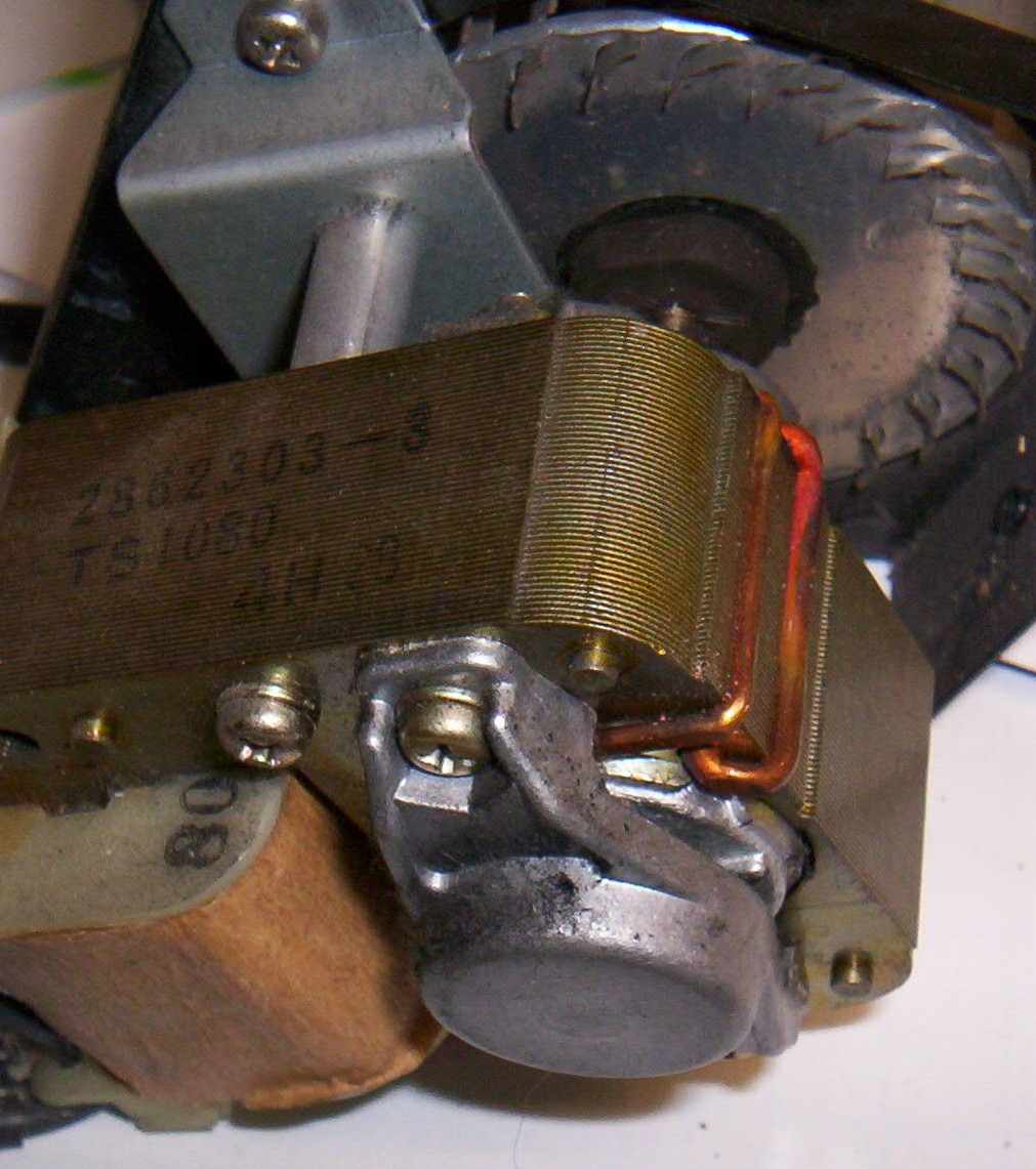 Spaltpolmotor an einem Radiallüfter.